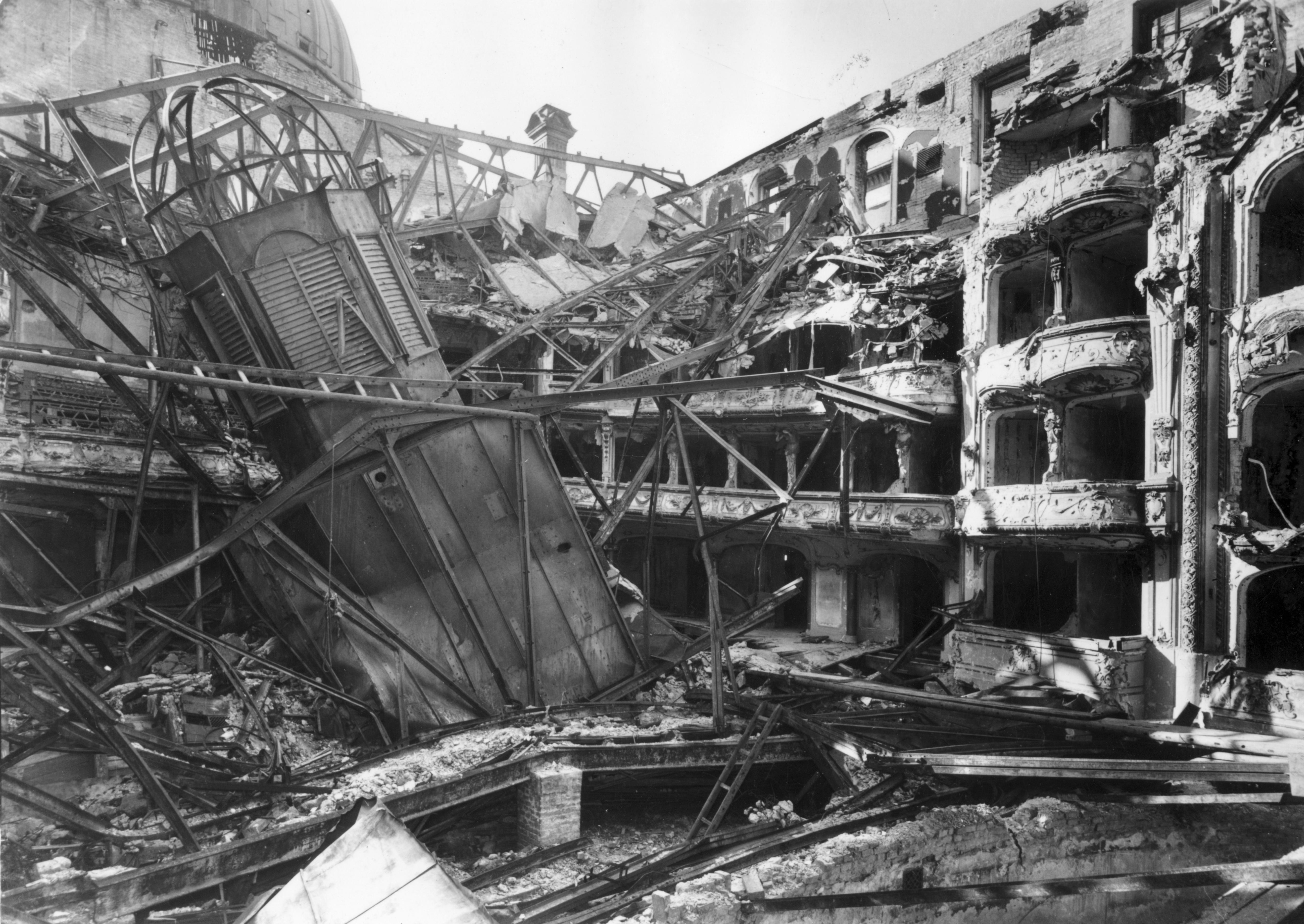 A bombatalálatot kapott Vígszínház